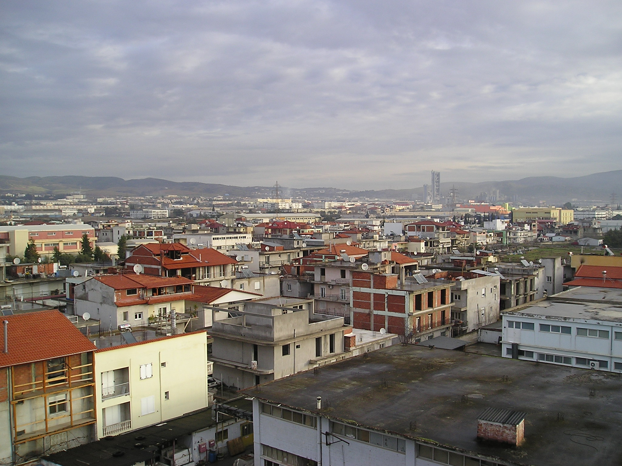 Η όψη της ευρύτερης περιοχής από ταράτσα οικοδομής.